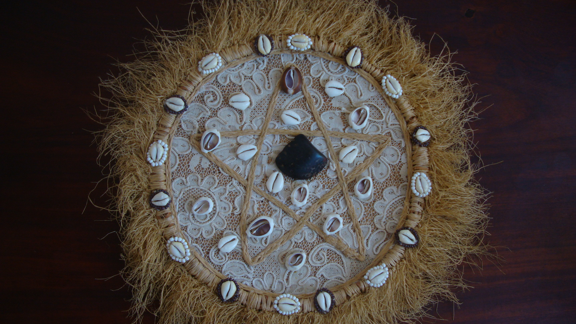 Odu Ôdi Merindilogun, Salvador, Bahia, Brasil.